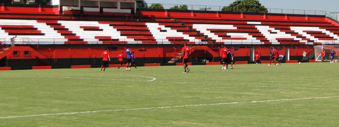 Atletico Clube Goianiense